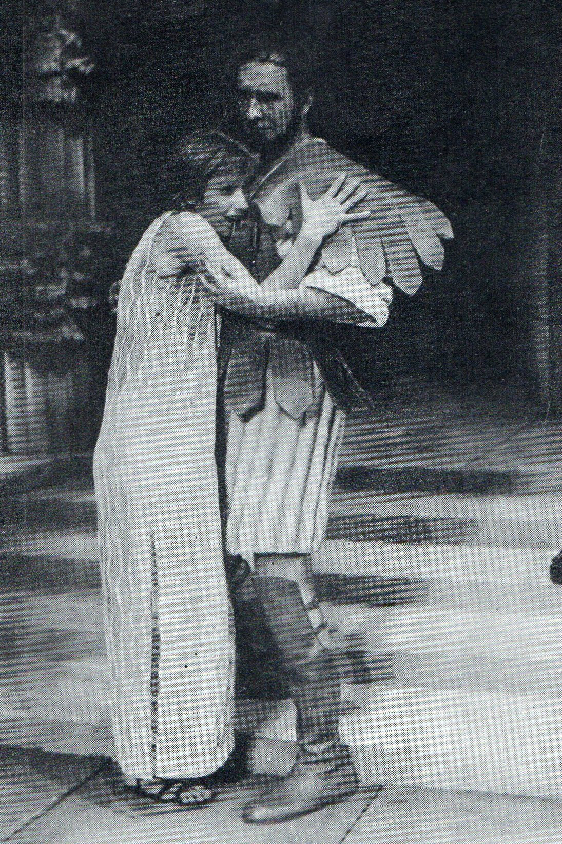 Jadwiga Jankowska-Cieślak jako Elektra i Andrzej Szczepkowski jako Egistos, spektakl "Elektra" (autor Jean Giraudoux), Warszawa (1973).